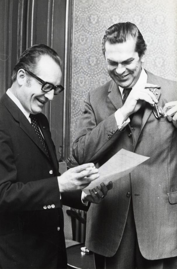 De heer P.J. Engels (KVP) in gesprek met premier Biesheuvel over voorgenomen bezuinigingen. Nederland, Den Haag, 2 juli 1971.